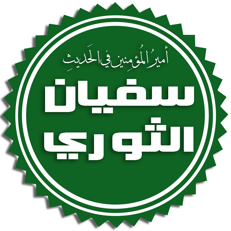 تخطيط اسم سفيان الثوري، أمير المؤمنين في الحديث